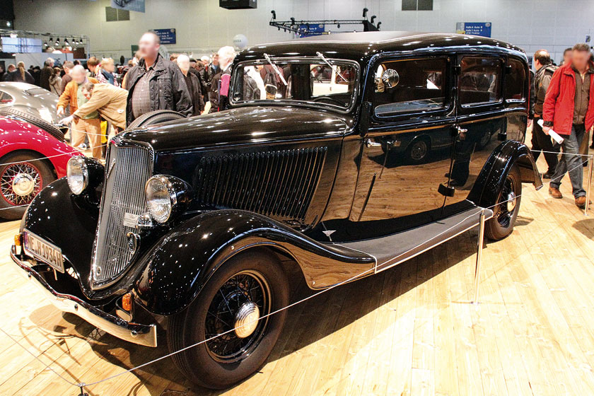 1934 Ford Rheinland Karosserie Hebmüller_IMG_0949